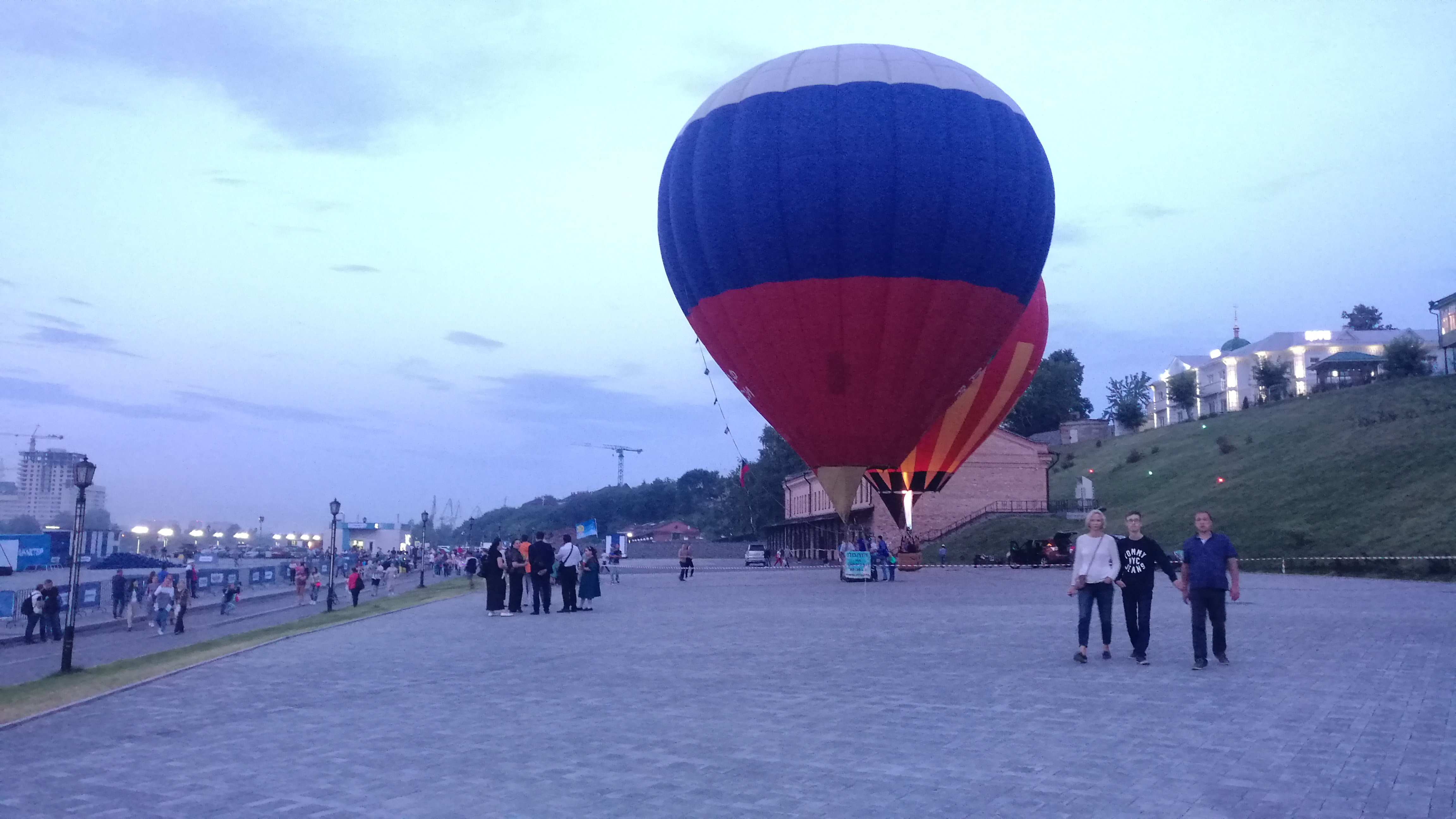 Aerbalonoj sur kajo de rivero Turo. Tjumeno, Rusio.